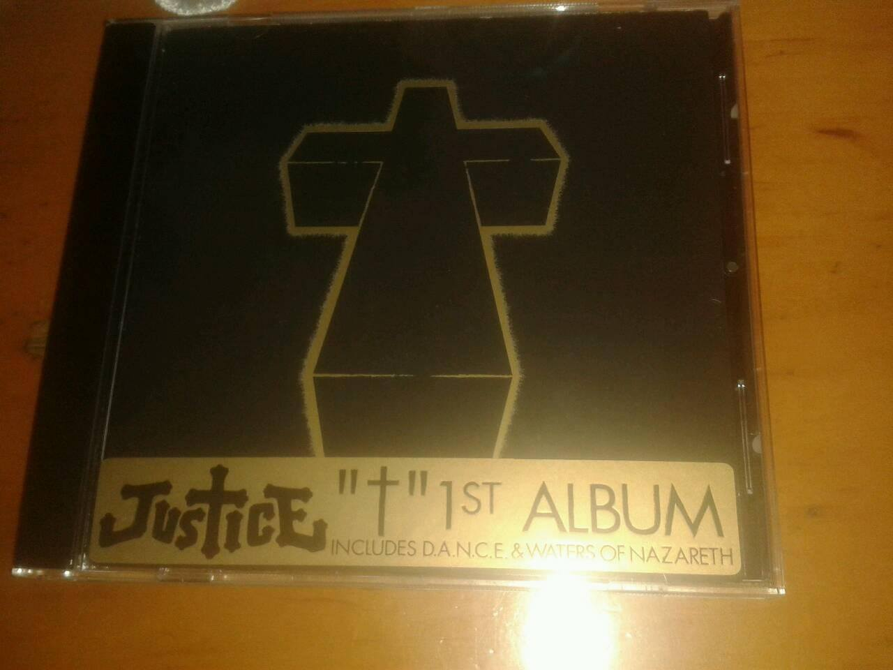 Wydanie CD Albumu